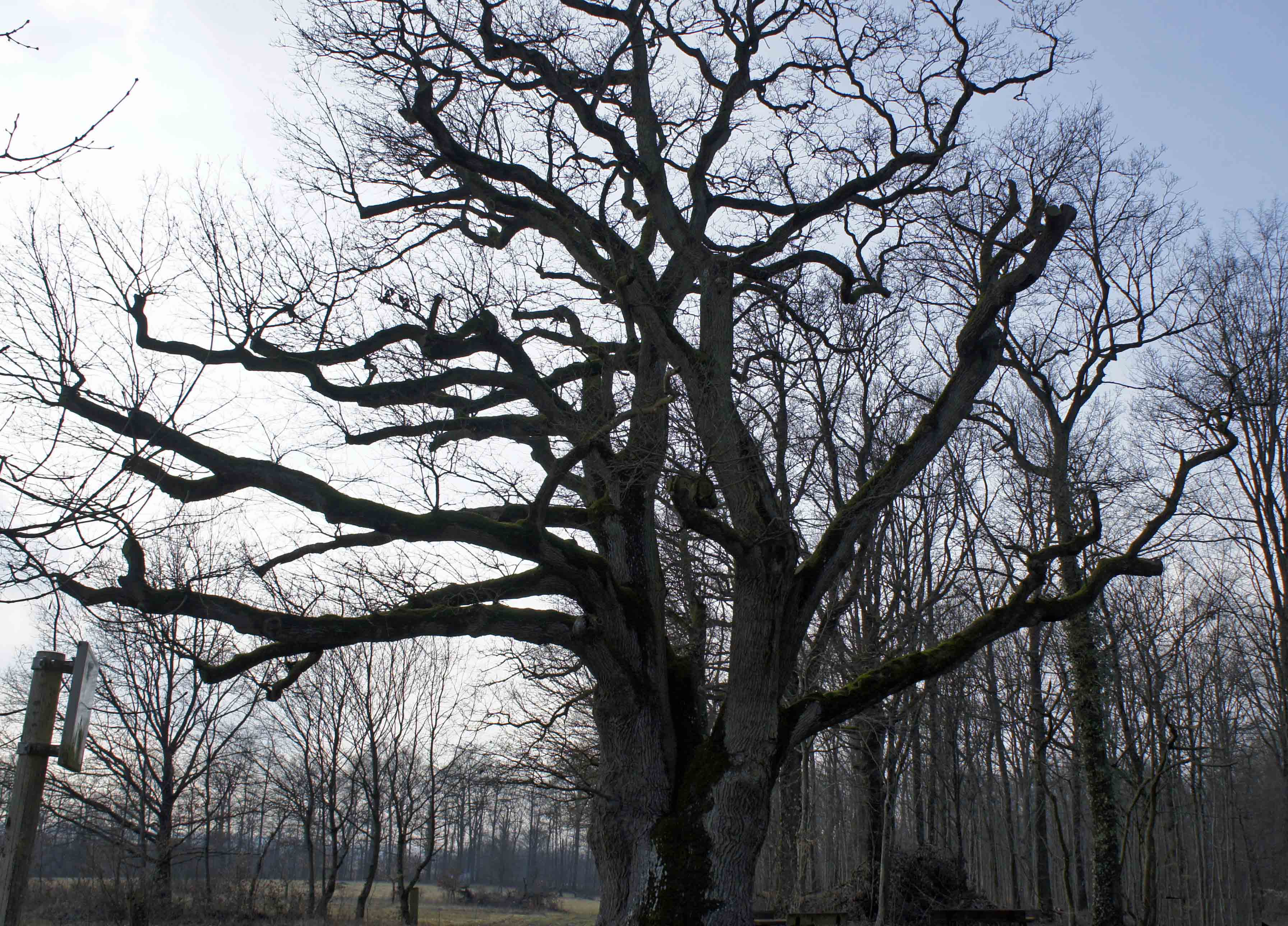 Villers en Argonne, le chêne tri-centennaire classé.